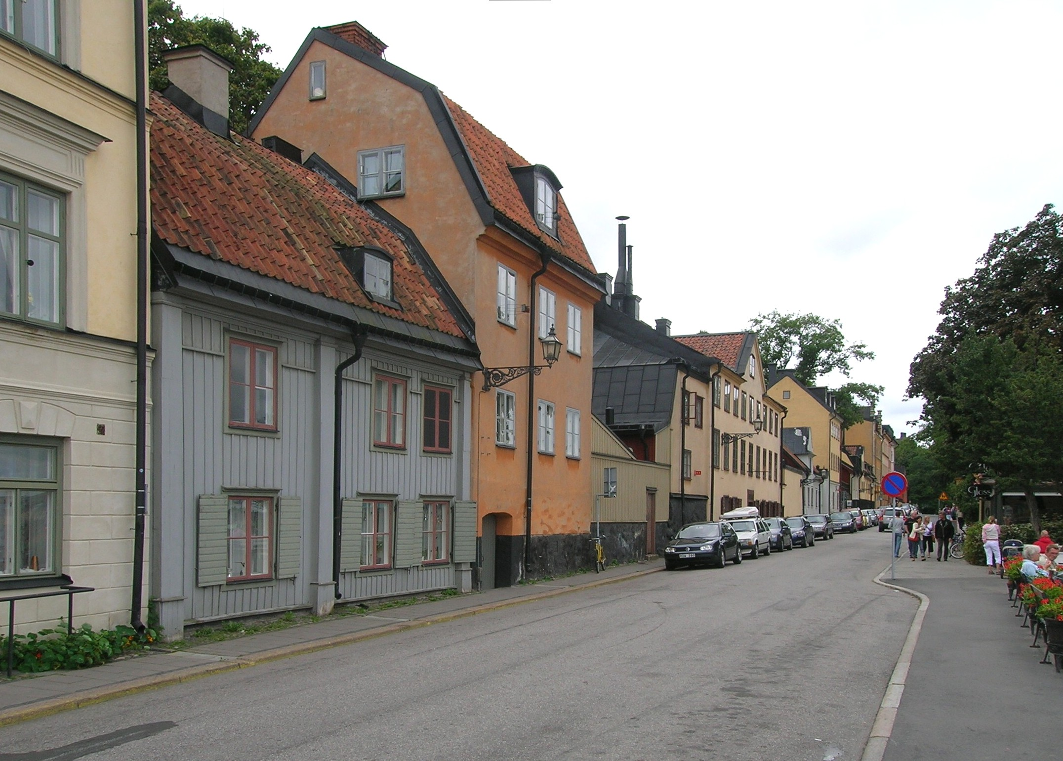 Fjällgatan, Stockholm. Från vänster nr 40, 38, 36, 34.